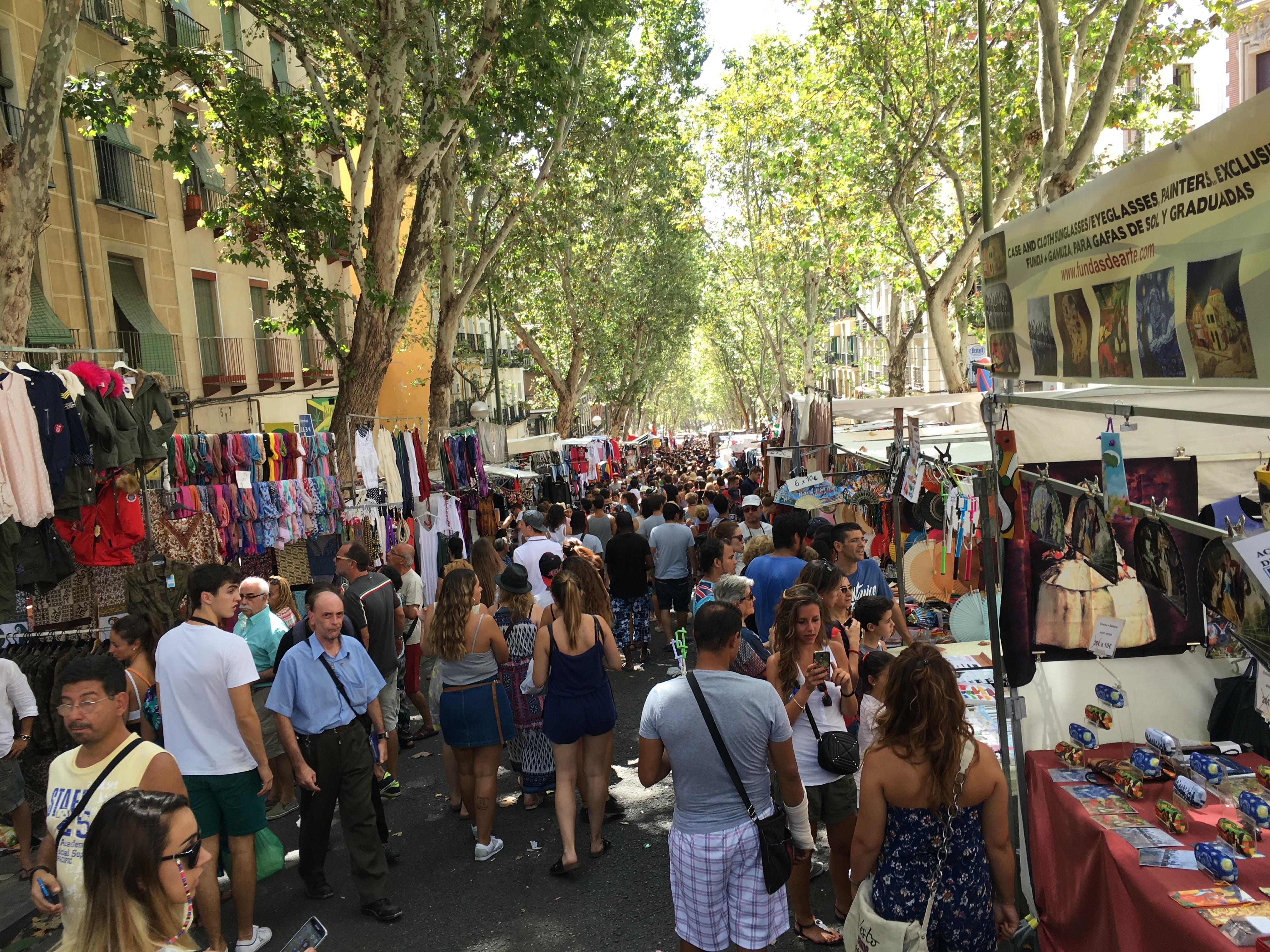 El Rastro market, Madrid 2016